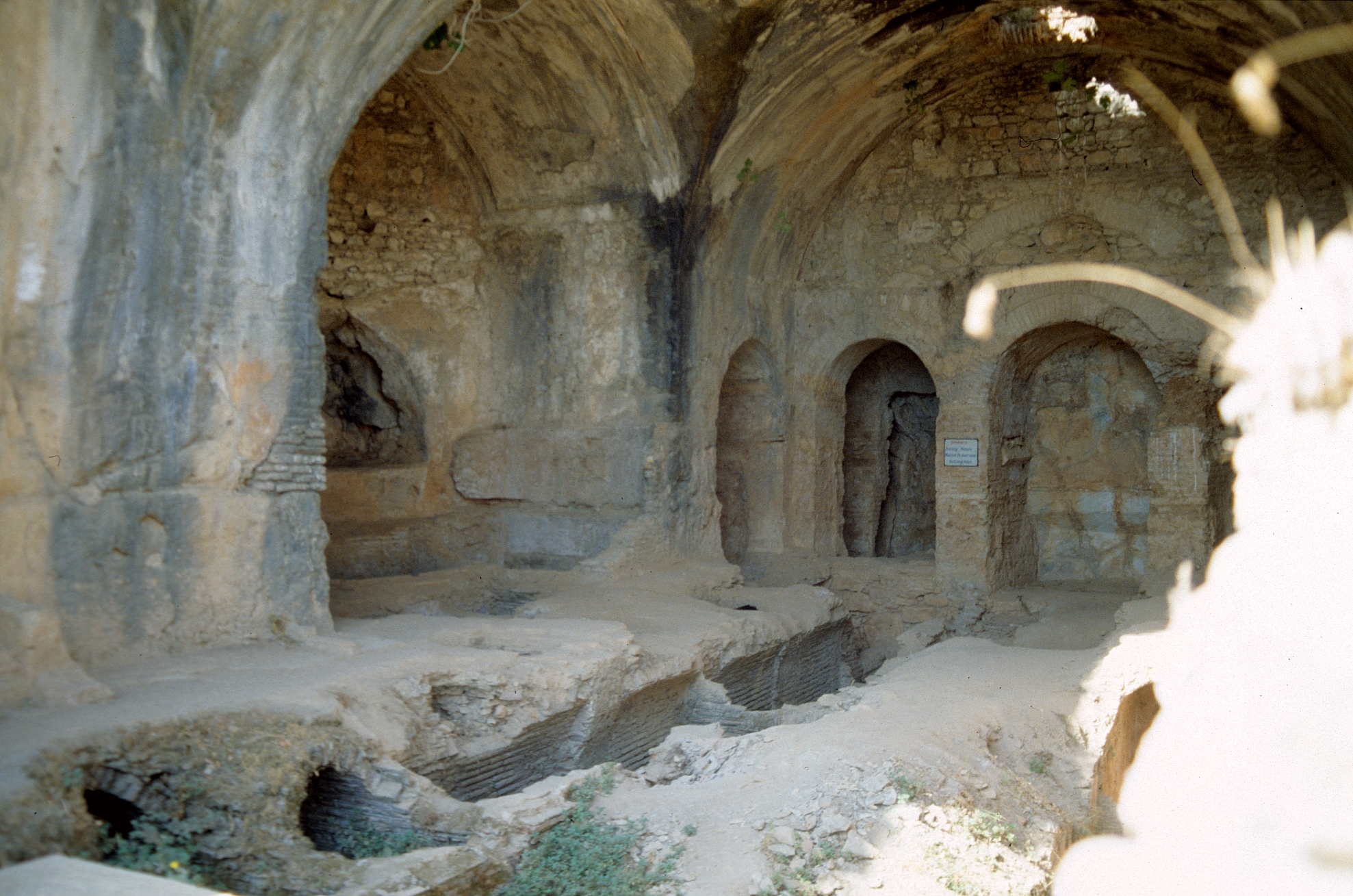 Siebenschläferhöhle bei Ephesos, Westtürkei, Gewölbe unter dem Kirchenboden